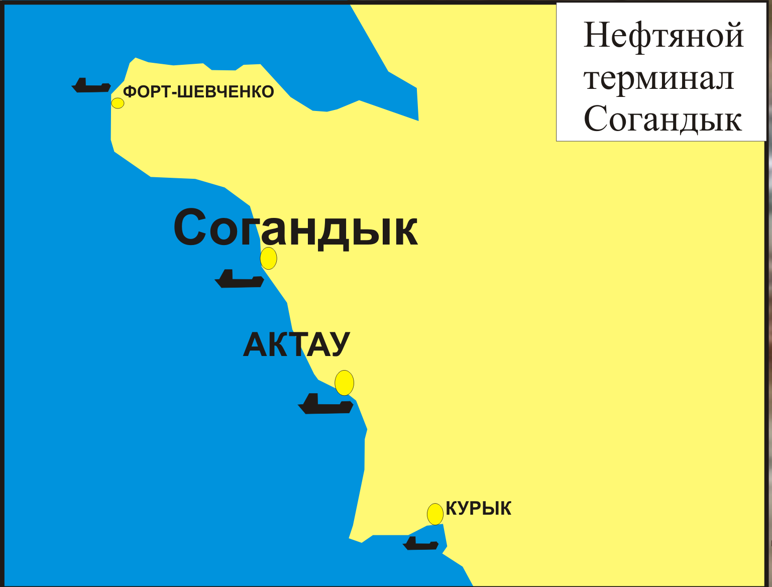 Согандык вид с космоса.